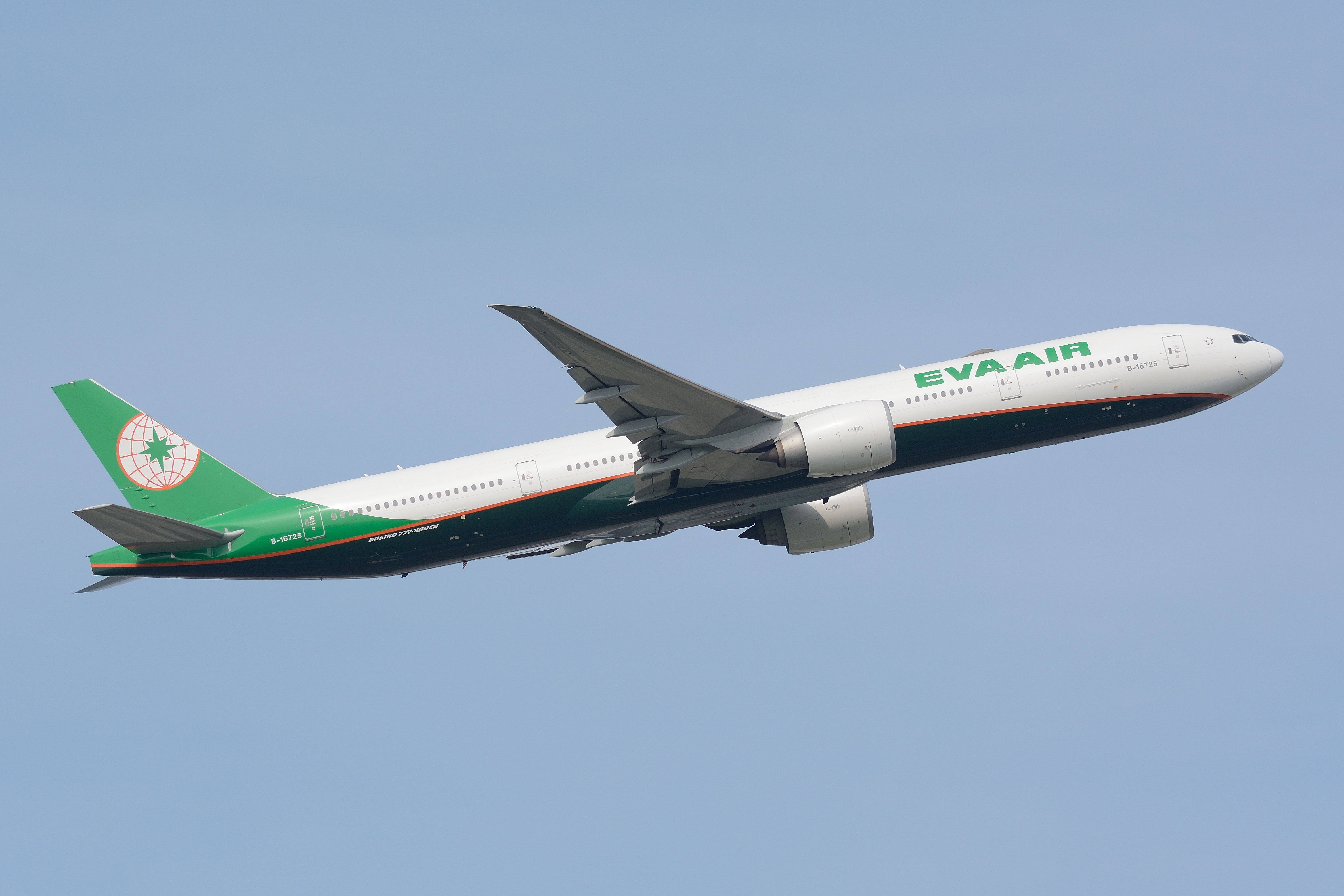 EVA Air, Boeing 777-300ER B-16725 NRT